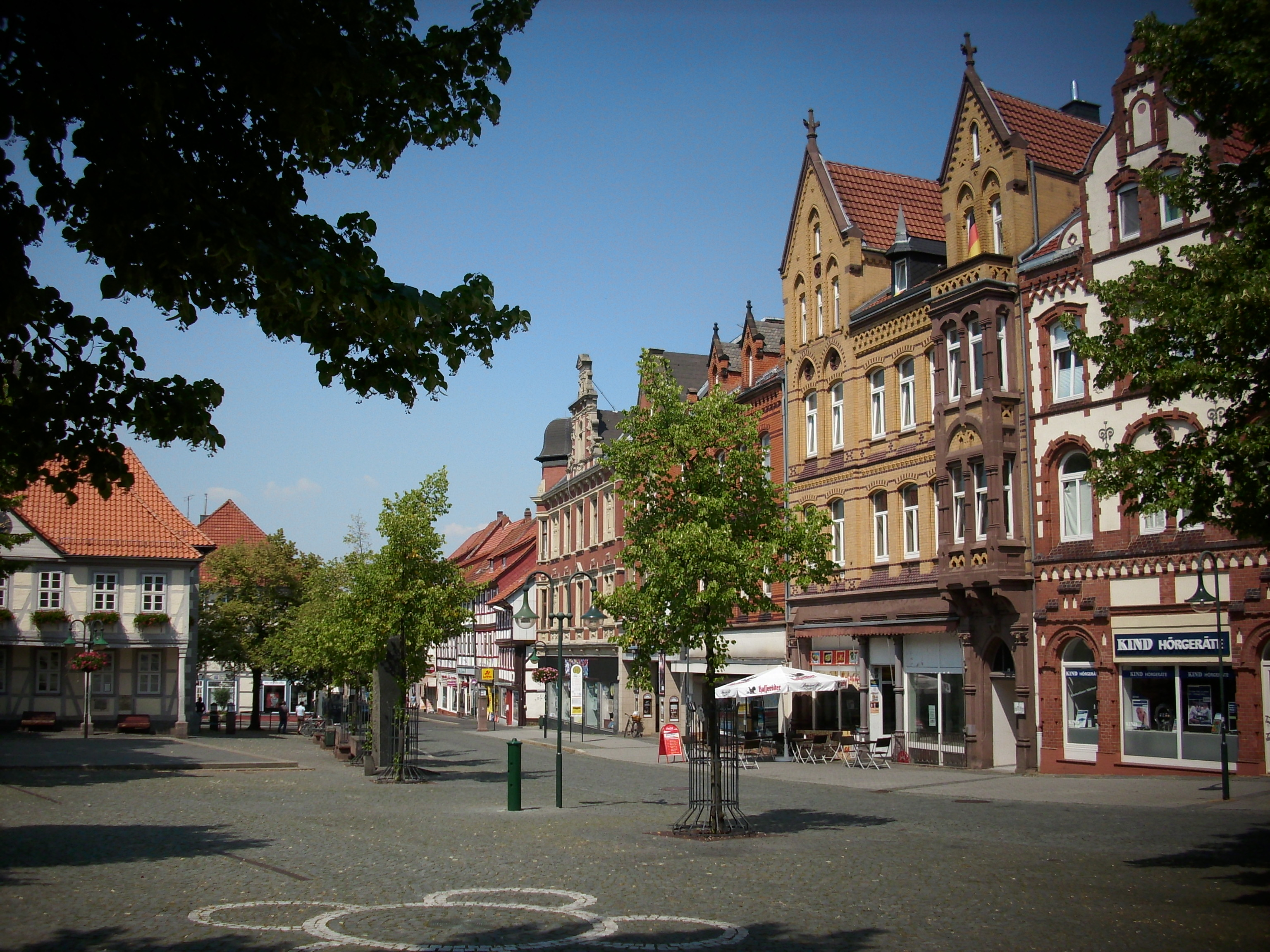 Steinbauten im Stil der Gründerzeit, welche nach dem großen Brand von 1892 am Northeimer Markt entstanden.